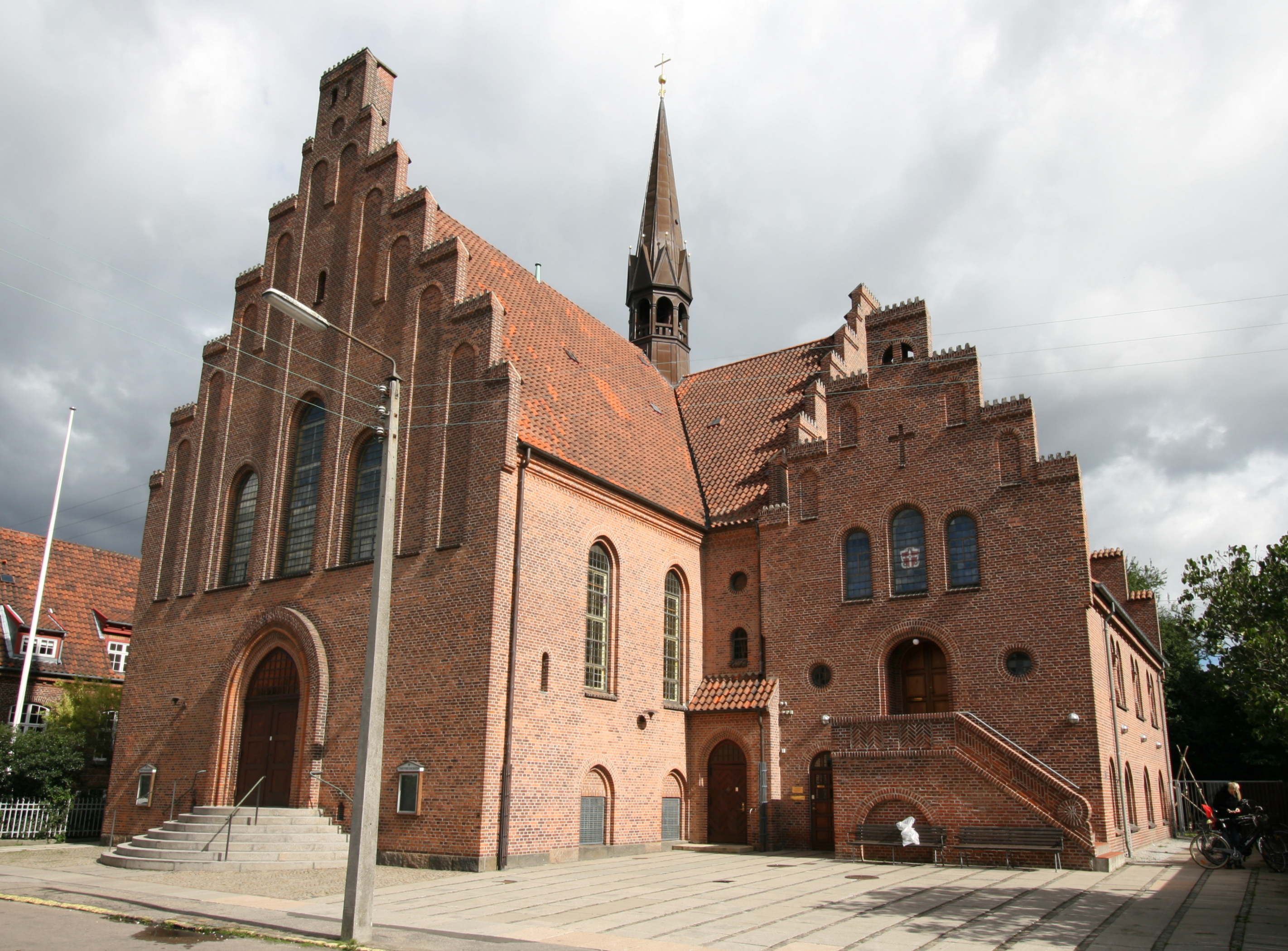 Timotheus Kirke in Copenhagen, Denmark. Exterior